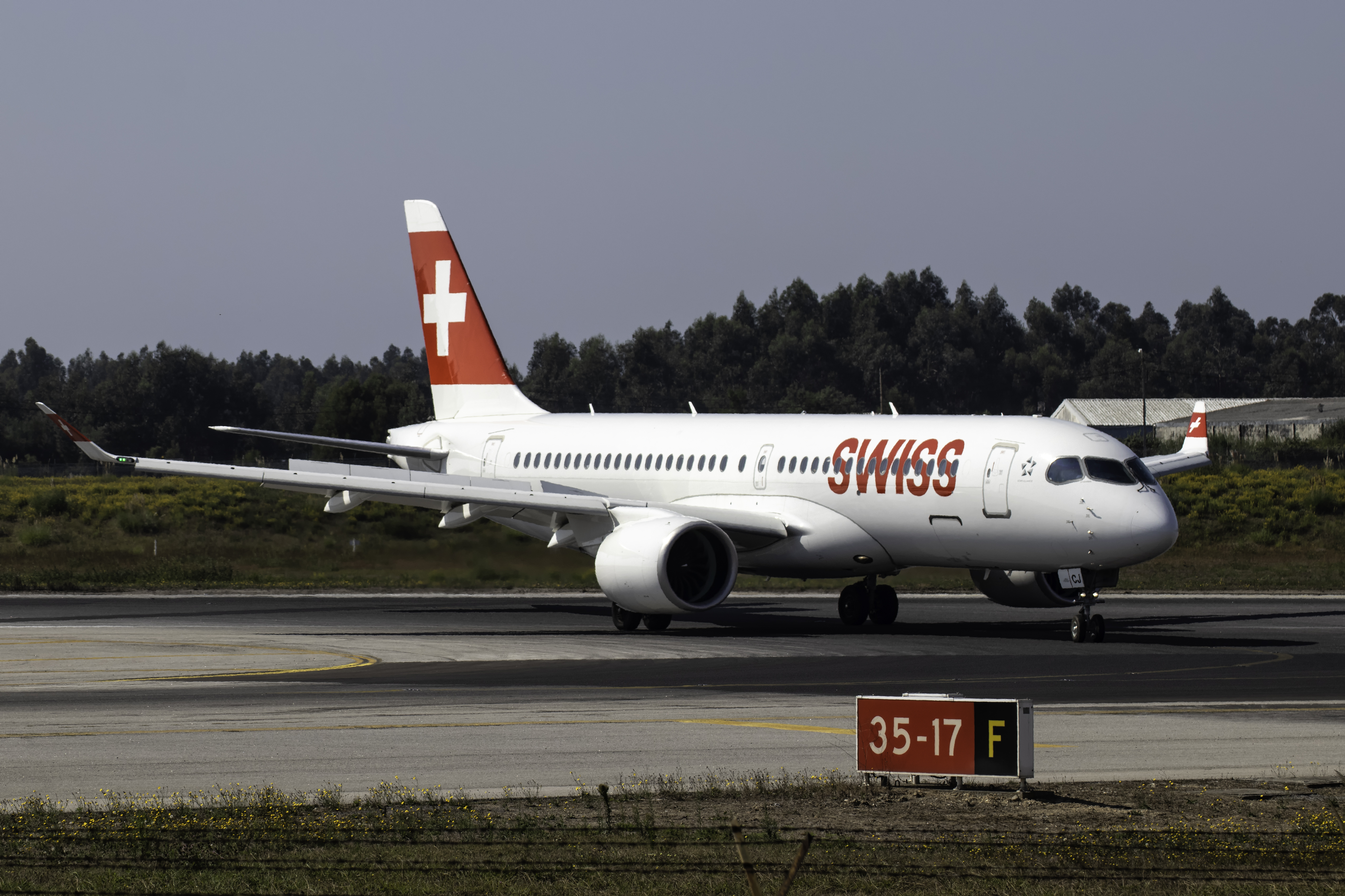 Airbus A220 de Swiss tras aterrar no aeoporto do Porto.